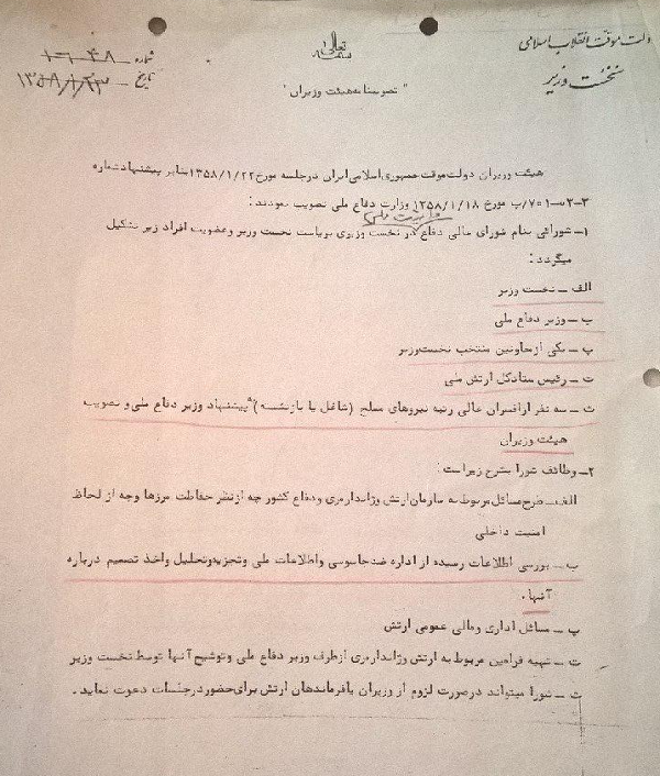 تصویب نامه هیئت وزیران در باب تشکیل شورای عالی دفاع و امنیت ملی‌